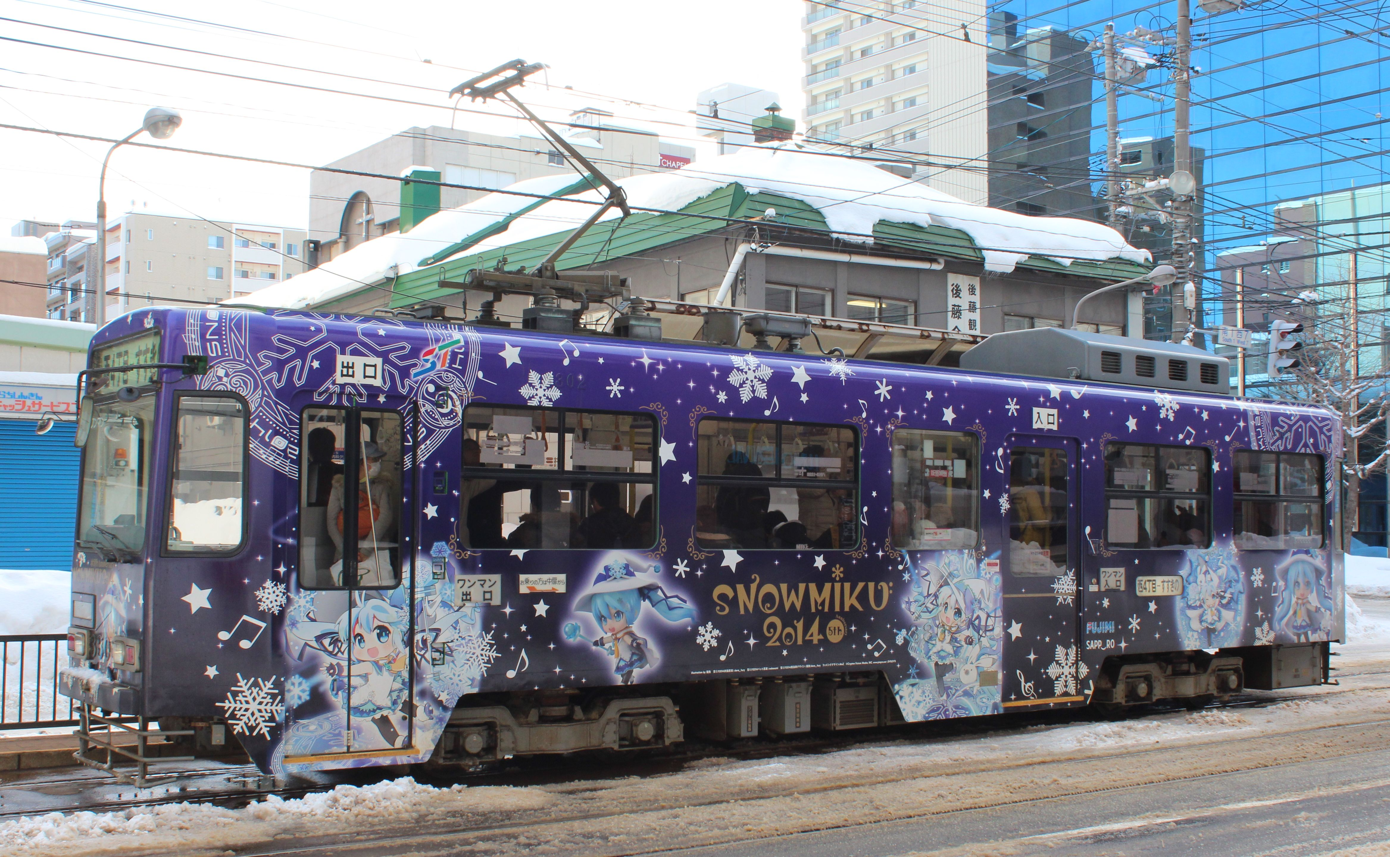 札幌市交通局3300形電車 「雪ミク」ラッピング